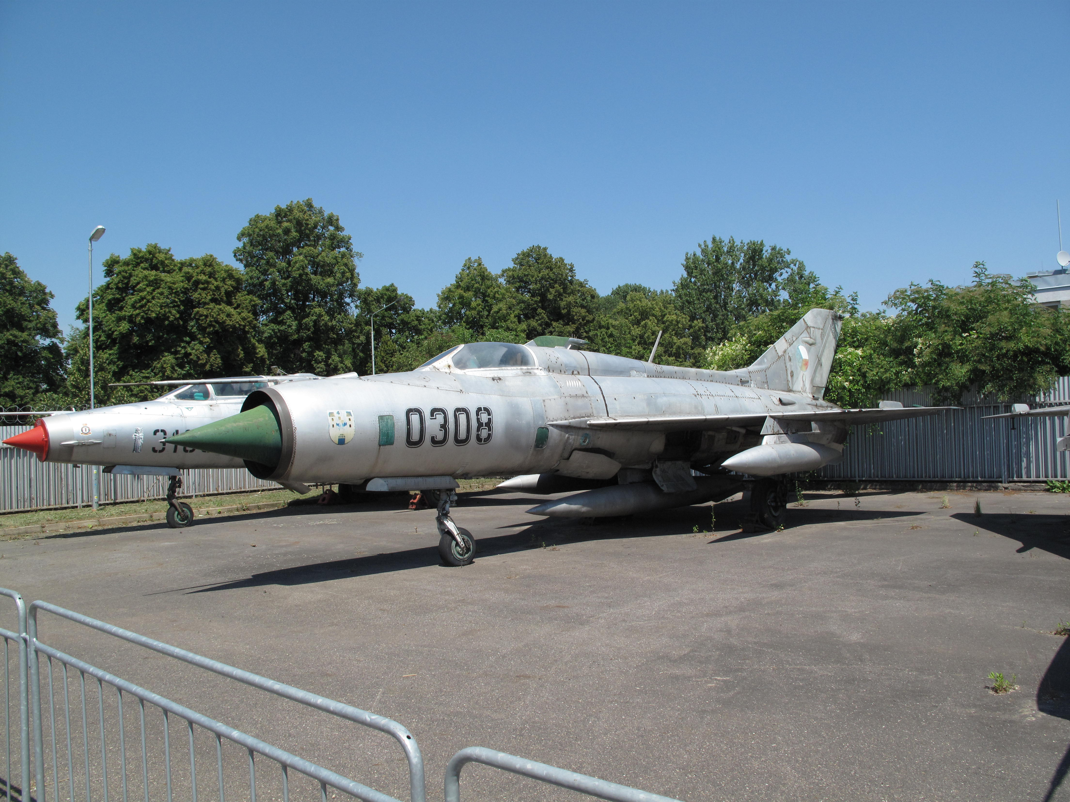 Mikoyan-Gurevich MiG-21PF ; Letecké muzeum Kbely